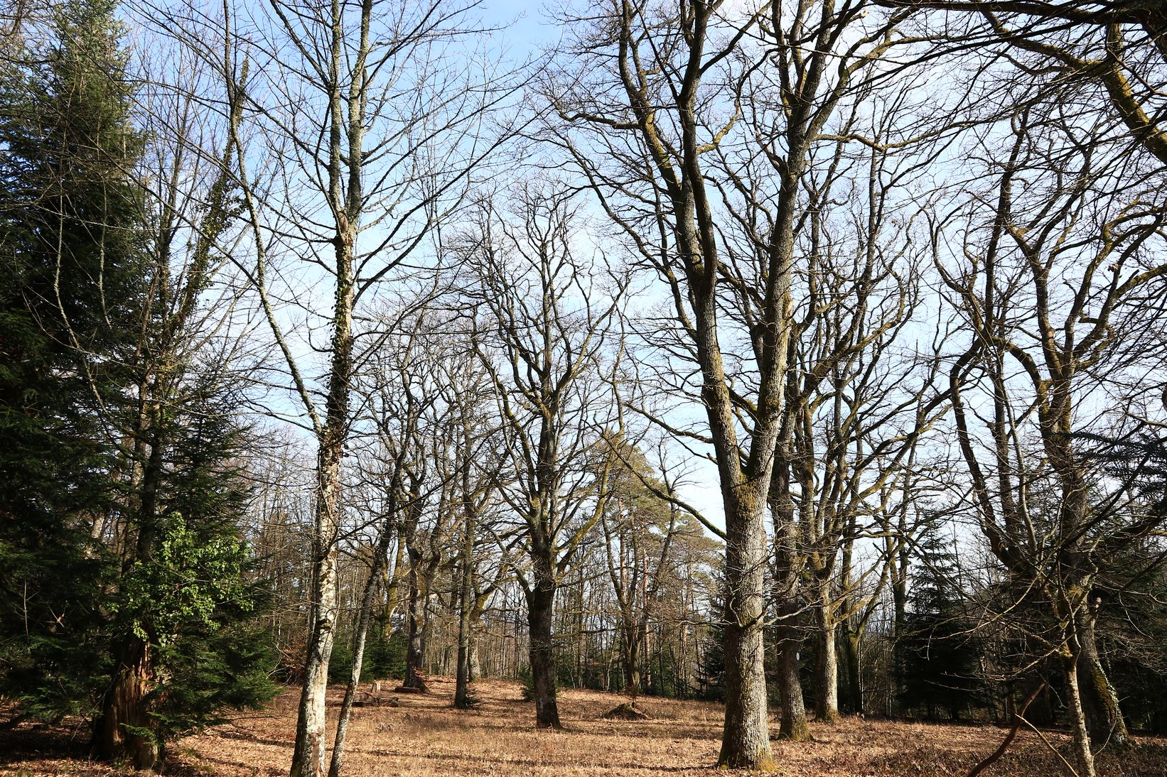 Le "Saulager"